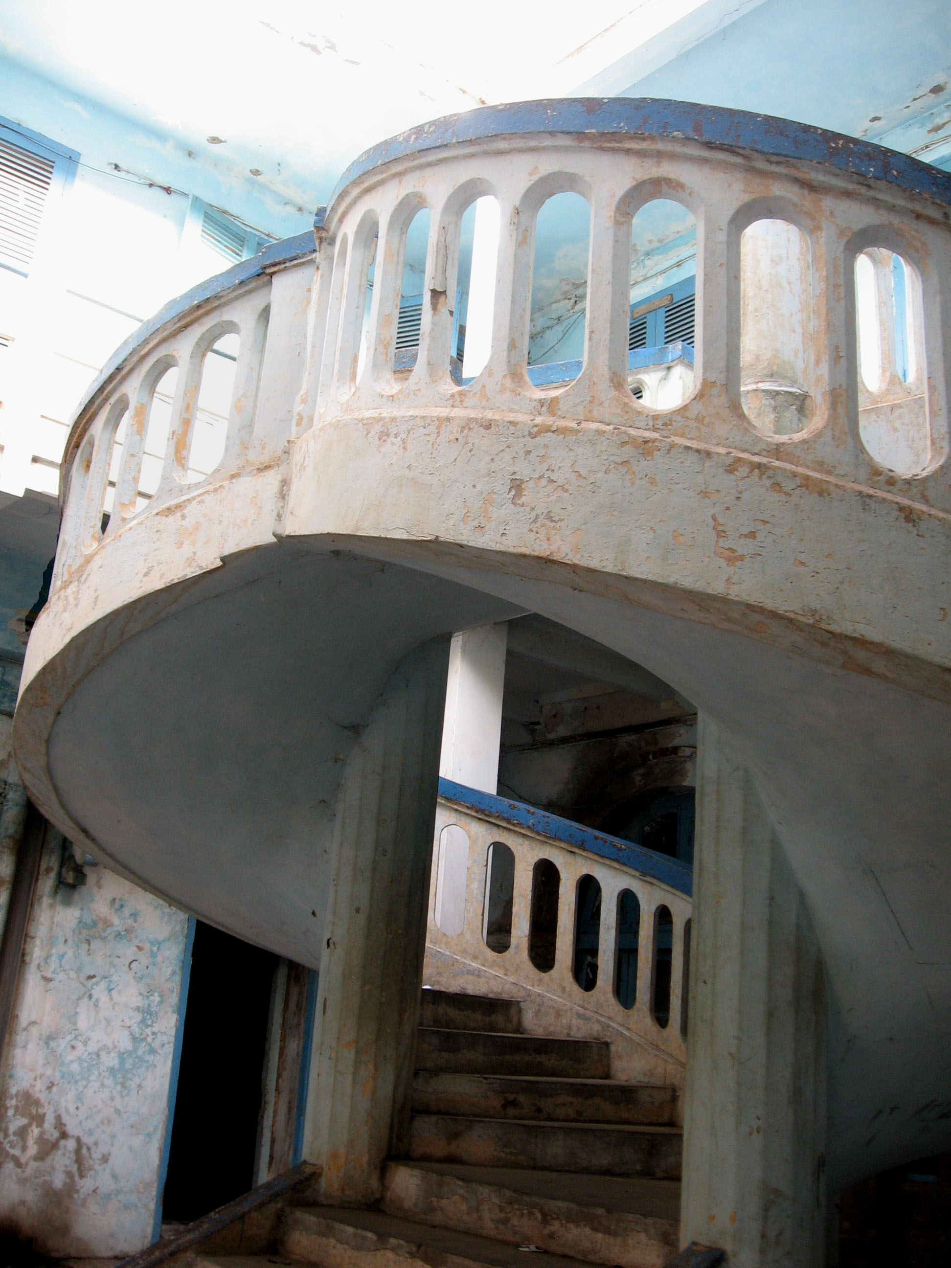 A Saint-Louis du Sénégal : escalier à double volée circulaire qui a inspiré une scène du film Coup de torchon de Bertrand Tavernier. La demeure appartenait aux soeurs de Saint-Joseph de Cluny, puis au Service des Impôts. Elle est aujourd'hui (2004) désaffectée. cf. Abdoul Hadir Aïdara, Saint-Louis du Sénégal d'hier à aujourd'hui, Grandvaux, 2004, p. 90